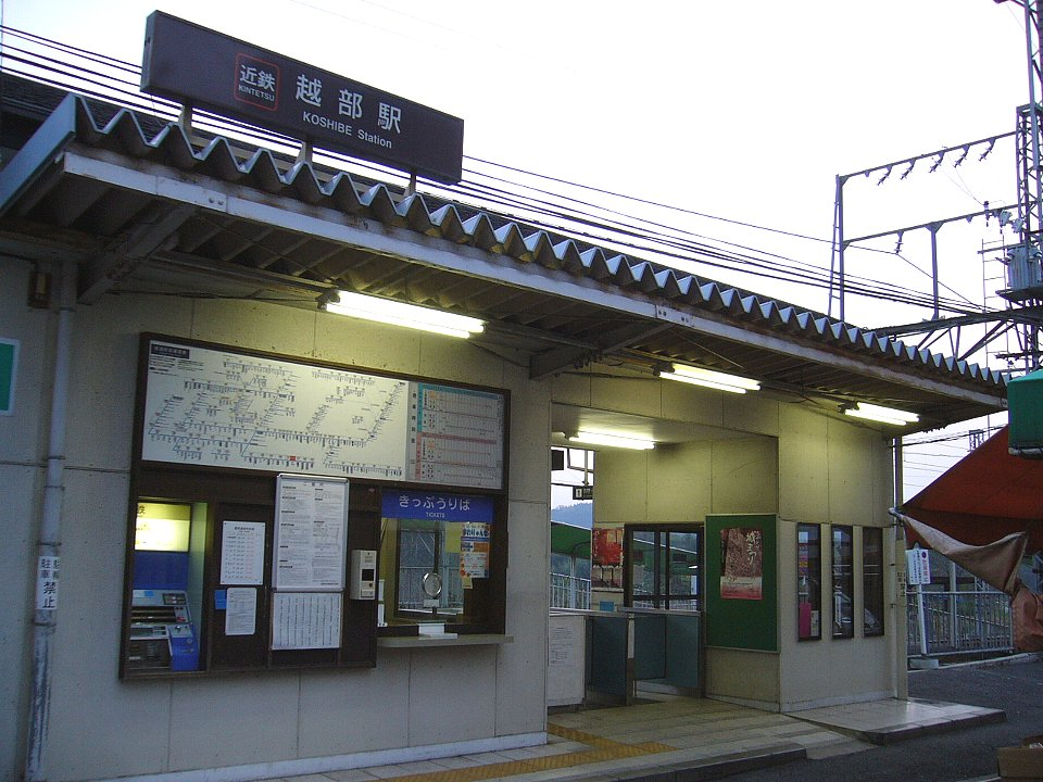 近鉄吉野線越部駅 駅舎